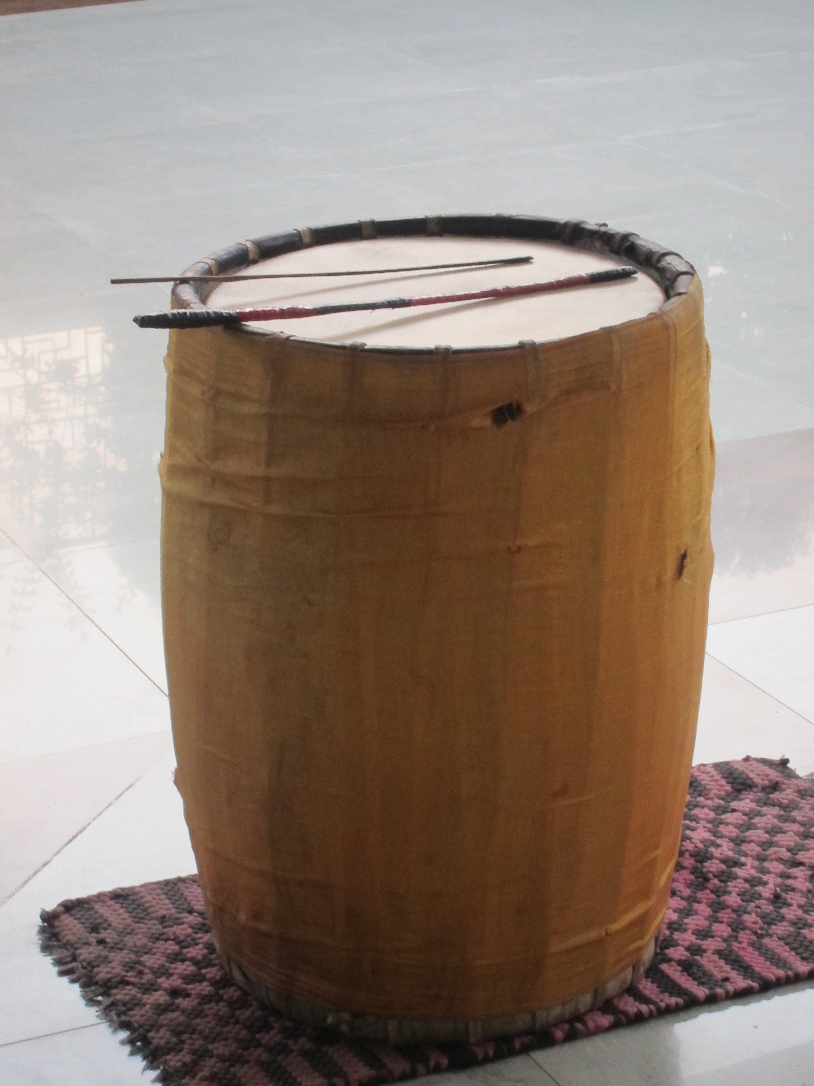 ঢাকেশ্বরী মন্দির